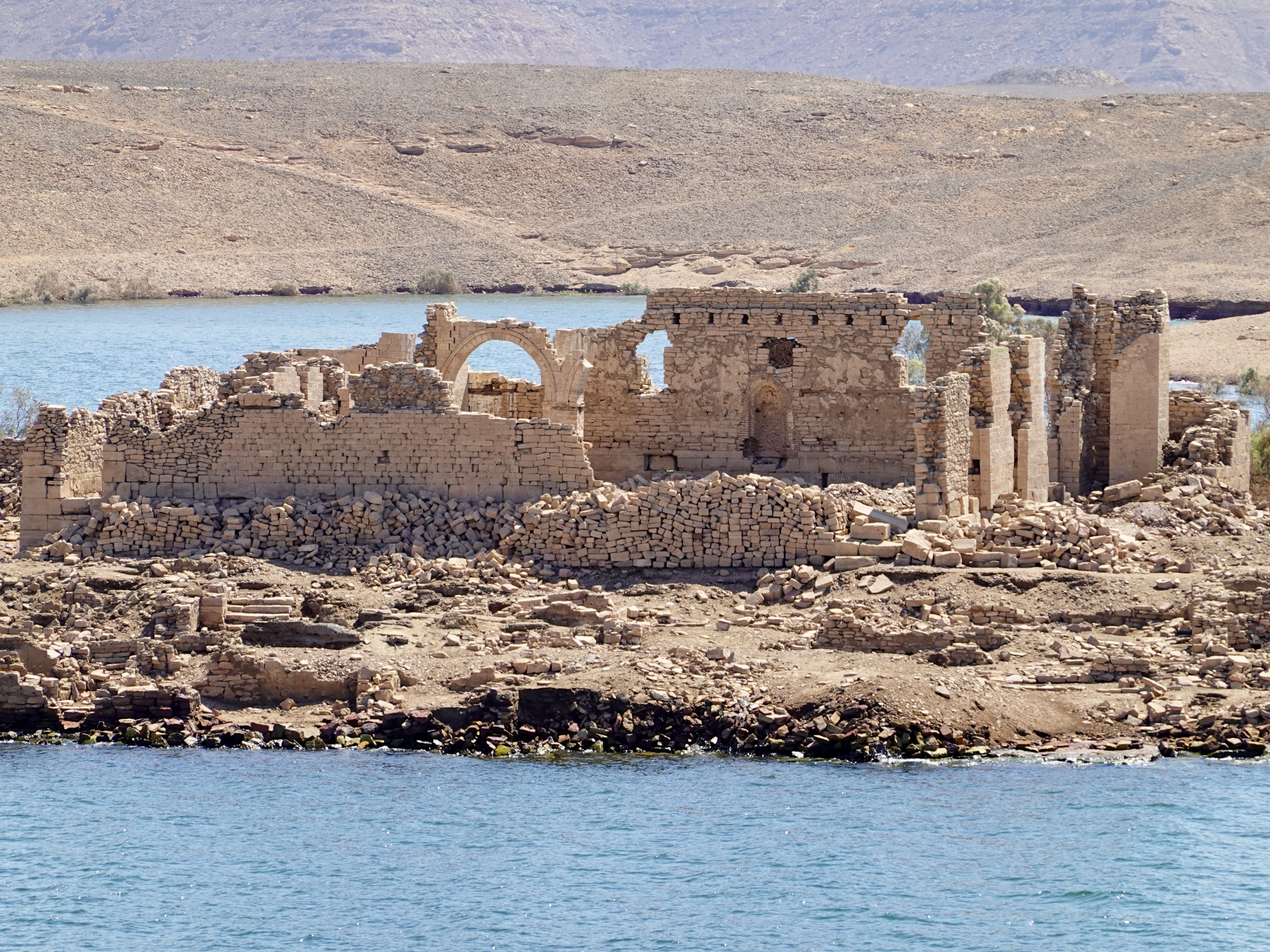 Bergspitze mit Ruinen von Qasr Ibrim im Nassersee, Ägypten